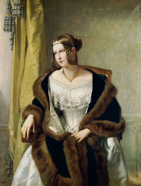 Portrait of Freifrau von Bernus